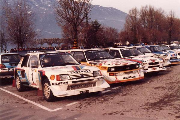 Photo prise lors du passage du RALLYE MONTE CARLO 1986, à AIX LES BAINS